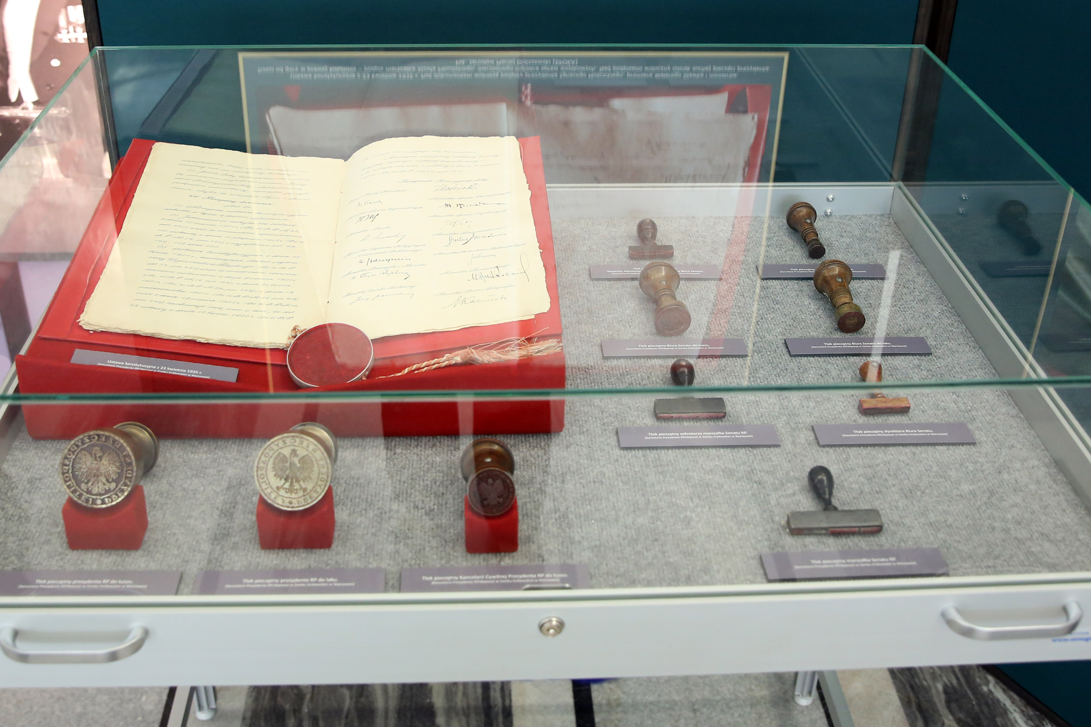 Ustawa konstytucyjna z 23 kwietnia 1935 prezentowana na wystawie Insygnia wolności w Senacie